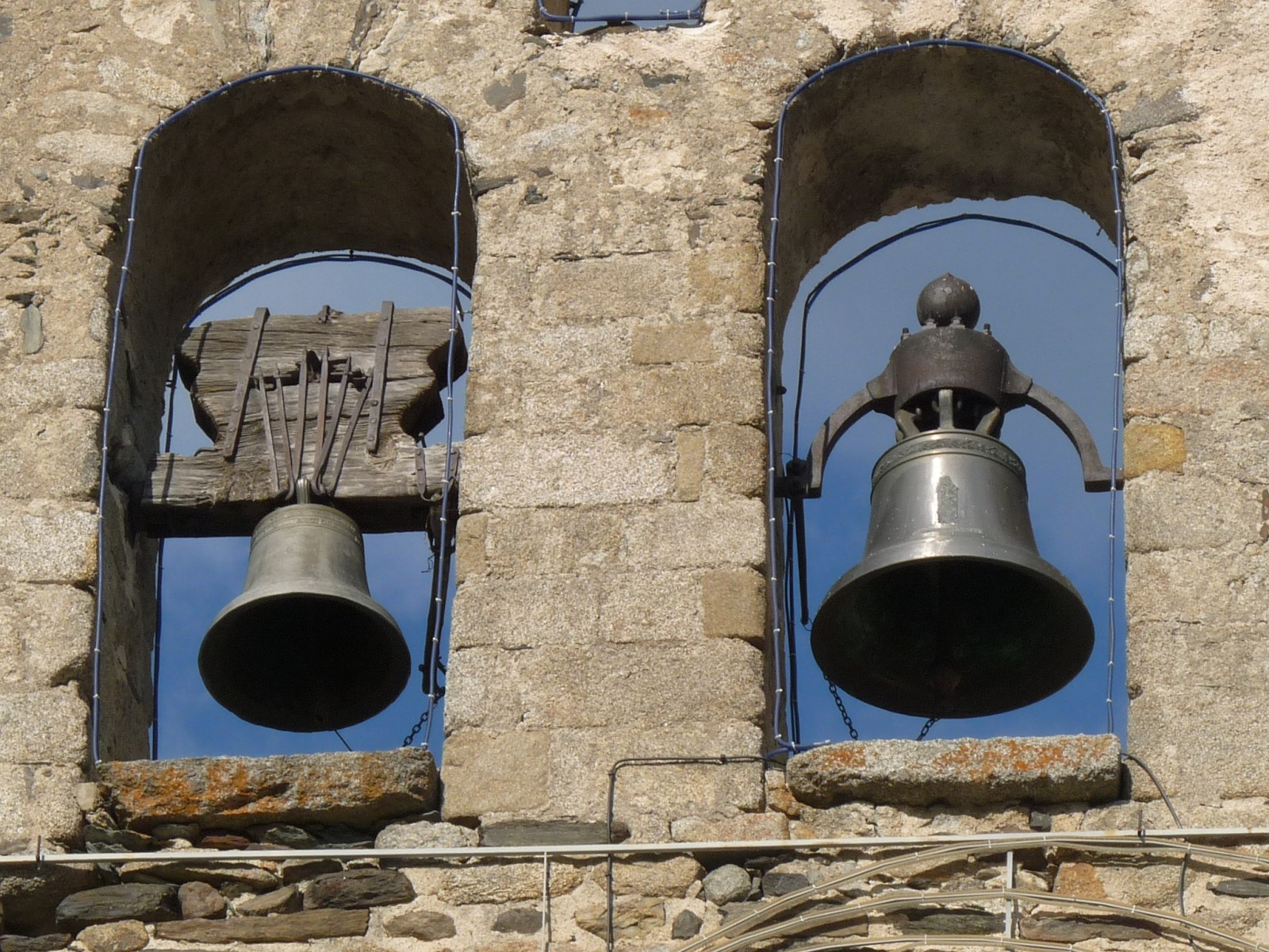 Eglise de Villeneuve, Angoustrine-Villeneuve-des-Escaldes, P.O., France